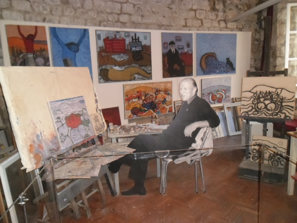 atelje slikara Đura Pulitike, Dubrovnik